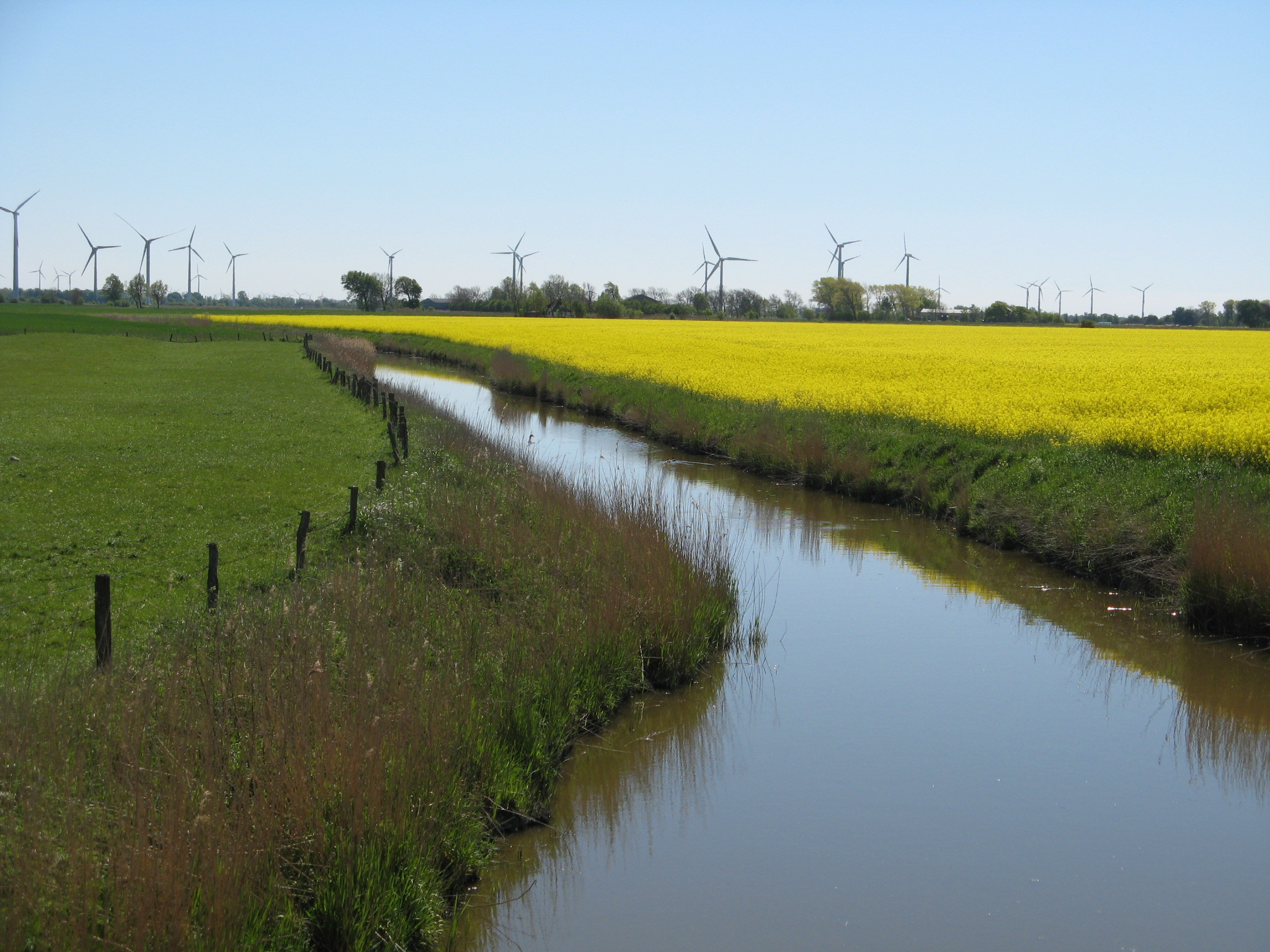 Entwässerungsgraben in Flederwurth, Groven Author: Dirk Ingo Franke